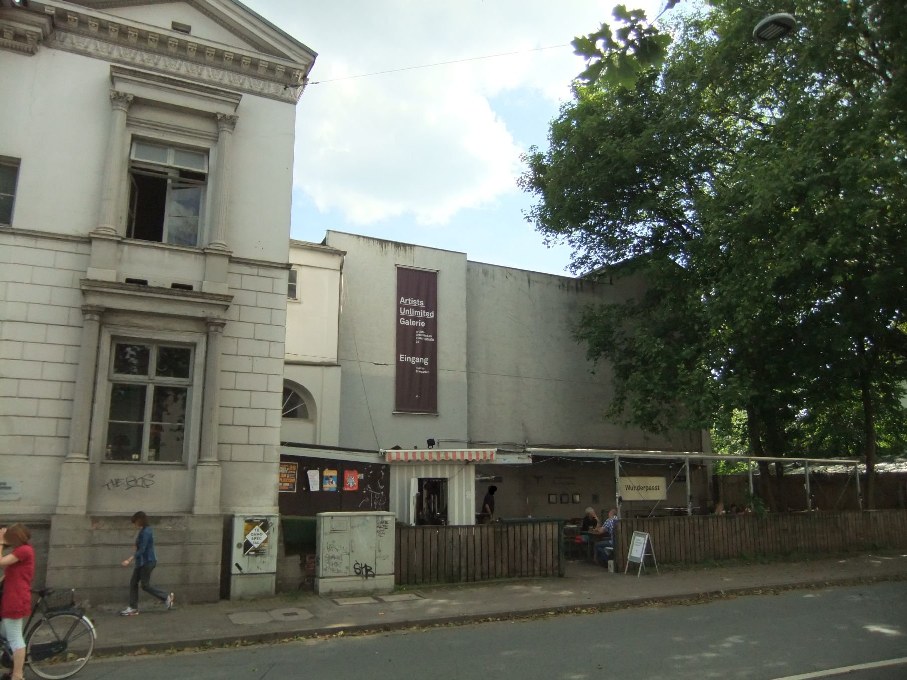 Eingang zur Gallerie artists unlimited in Bielefeld. Hinterer Teil mit Biergarten des Café Milestones.